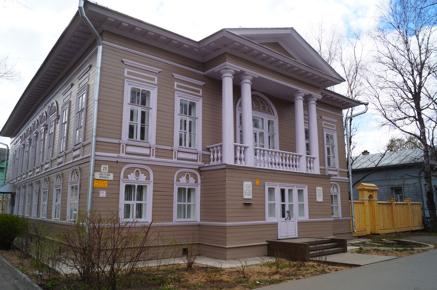 Дом жилой (дом Соковикова): проспект Советский, 20/28, Вологда, Вологодская область